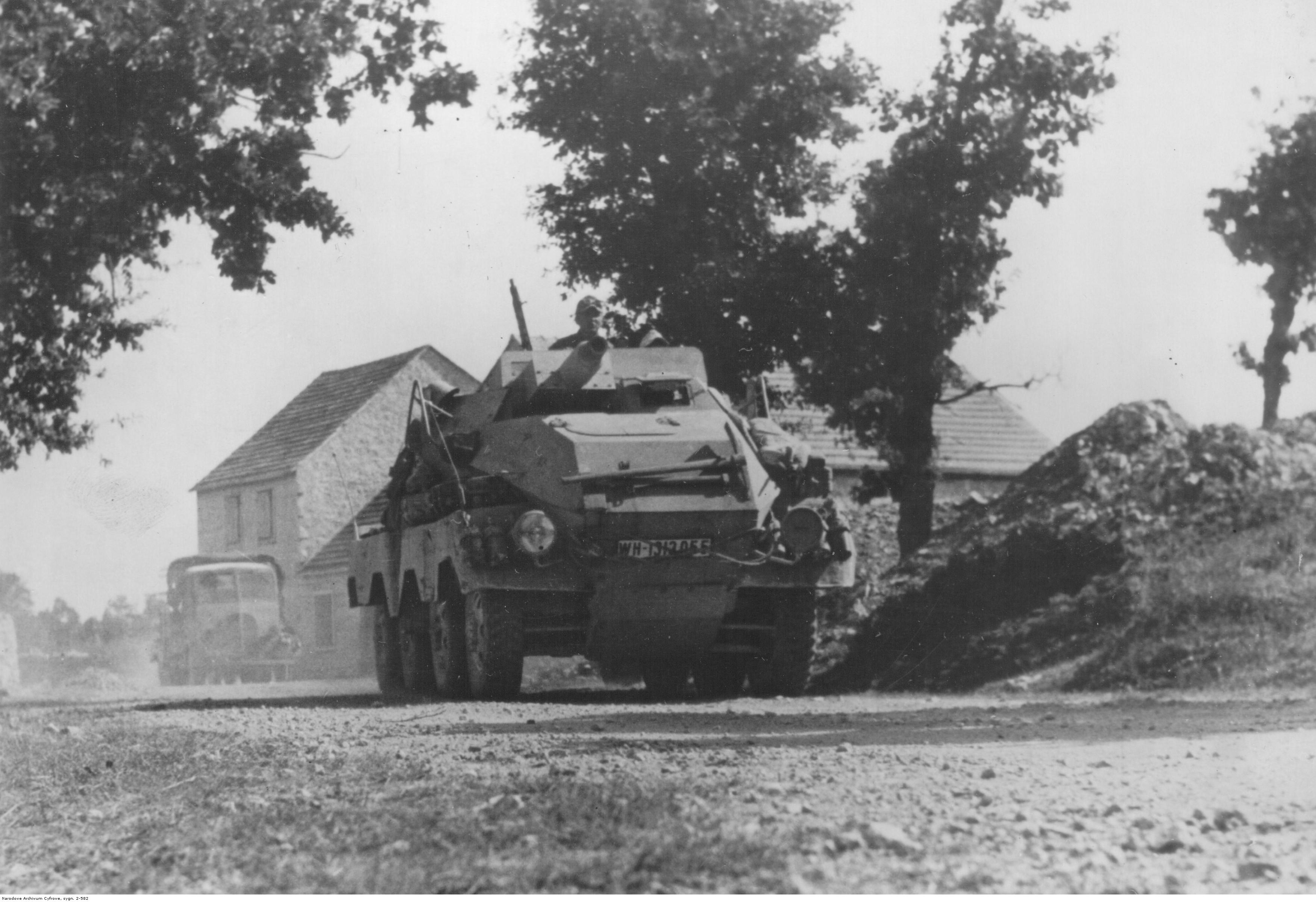 Niemiecki samochód pancerny SdKfz 233 z działem StuK L/24 kal. 75 mm we wsi nad wybrzeżem Adriatyku.